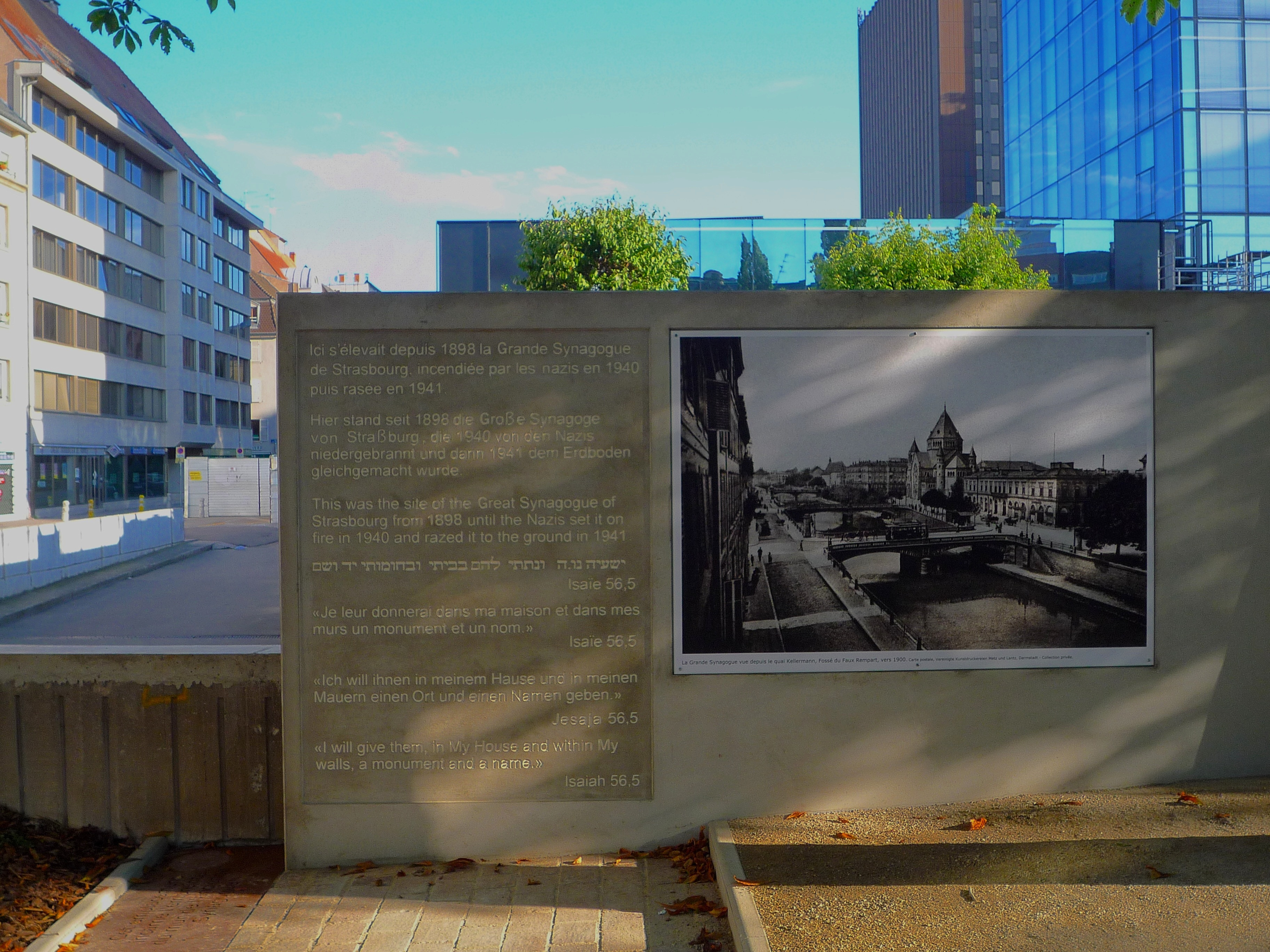 Strasbourg le monument de l’allée des Justes 01